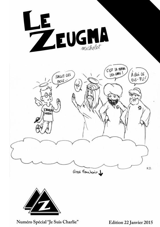 Voici ma couverture du zeugma j2015